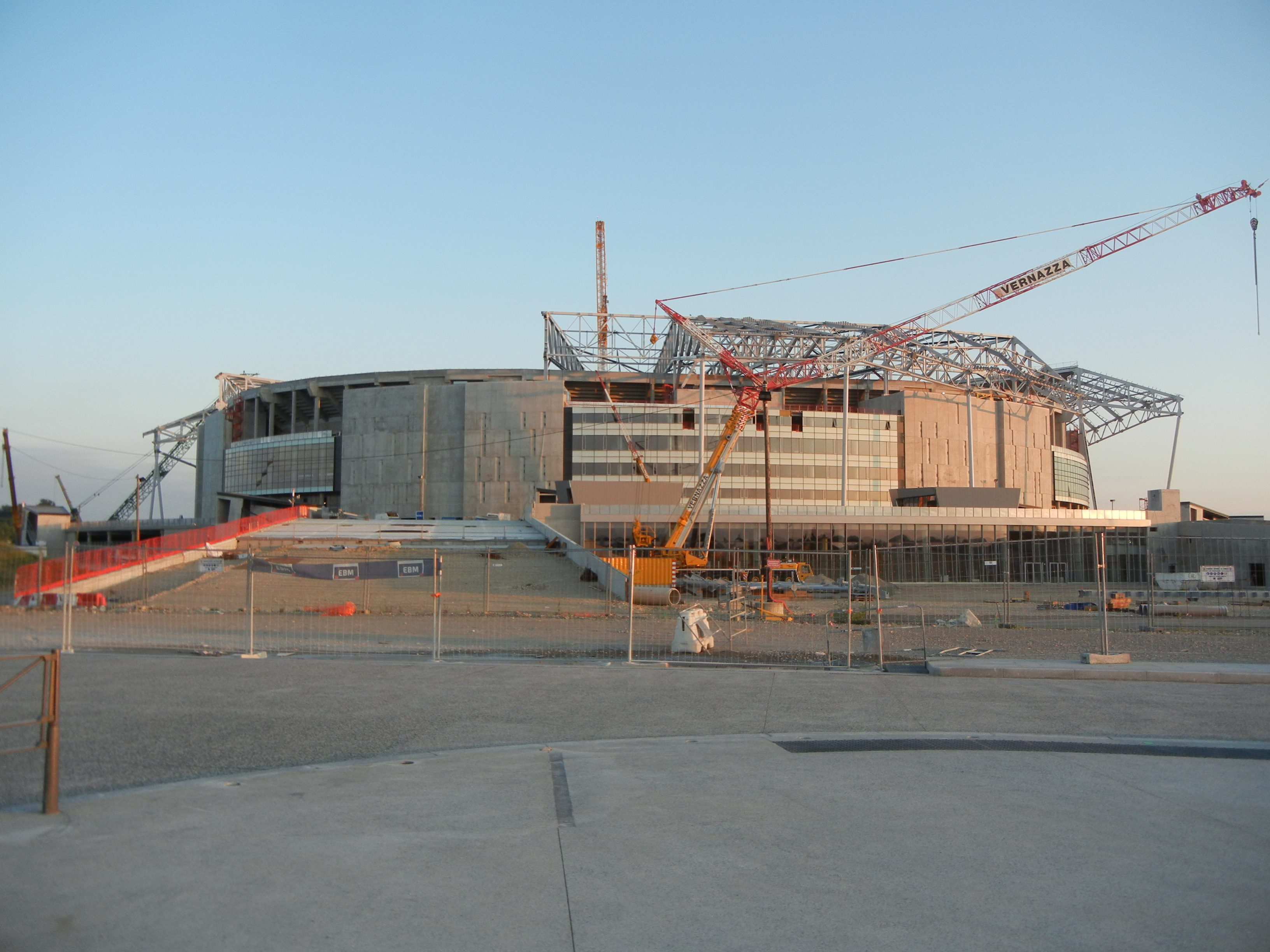 Stade des Lumières Avancement du chantier en mai 2015